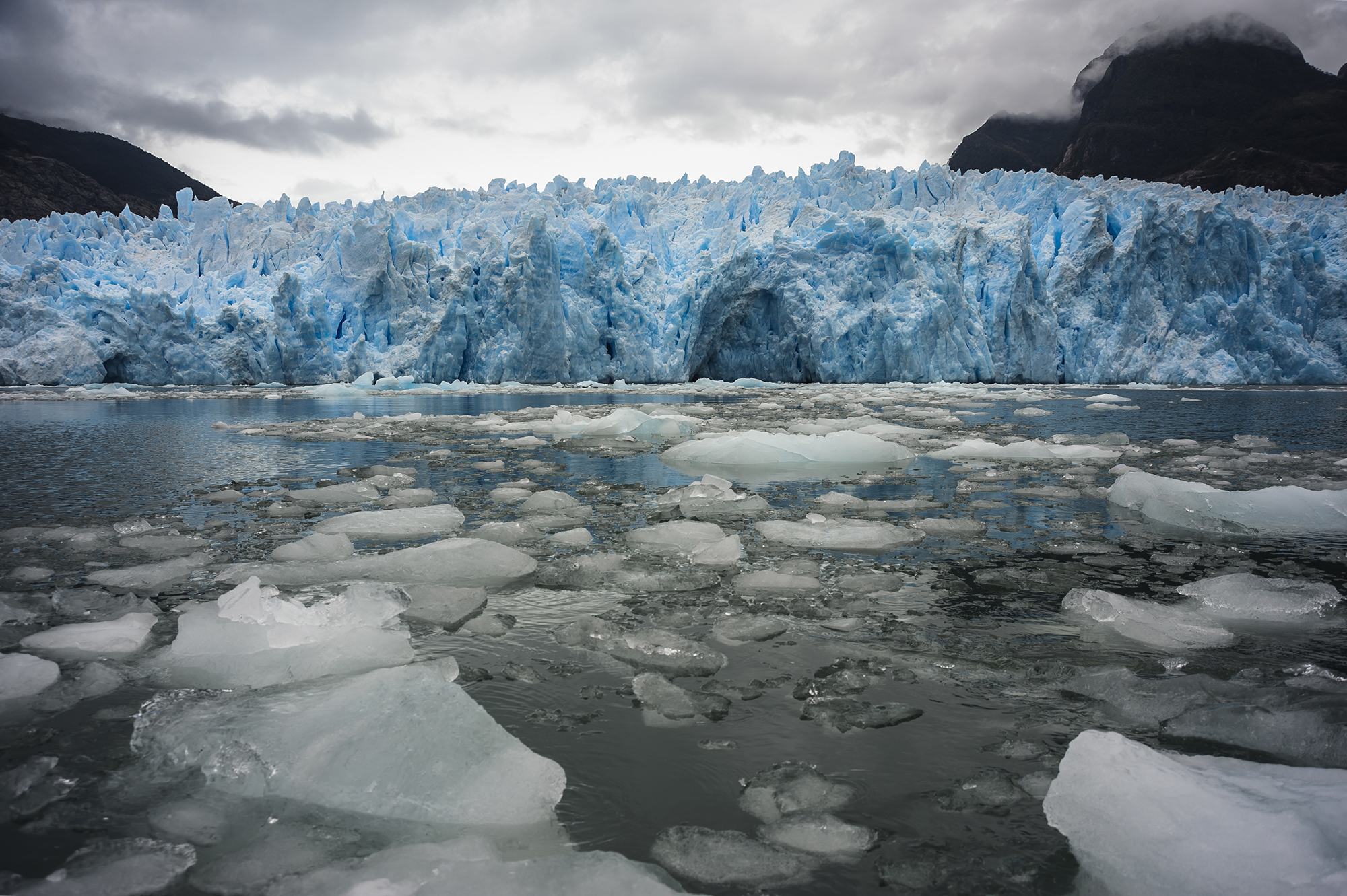 Laguna San Rafael es un lago costero localizado en la Región de Aysén, Chile. Abarca 123 km2 de superficie, y está dentro del Parque Nacional Laguna San Rafael. Al norte, la laguna se conecta con el canal Moraleda a través de varios golfos y esteros. Al sur y al este limita con el istmo de Ofqui y la península de Taitao. Al sur de la laguna se encuentran los Campos de Hielo Norte.